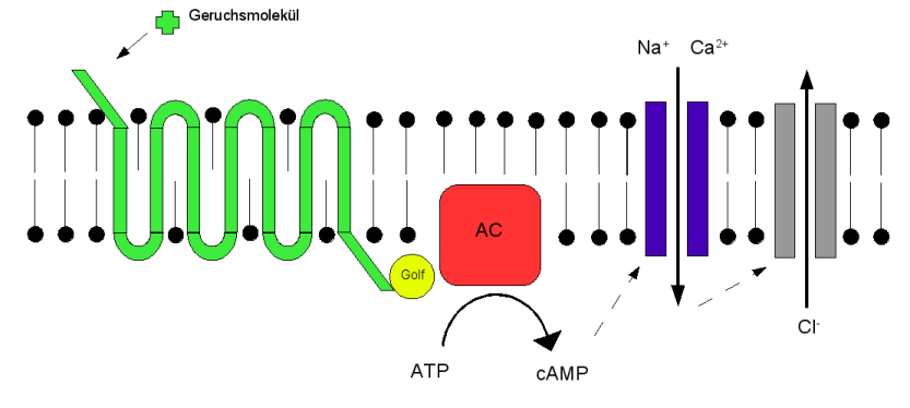 Schema der Signaltransduktion beim Geruchsrezeptor (Protein)